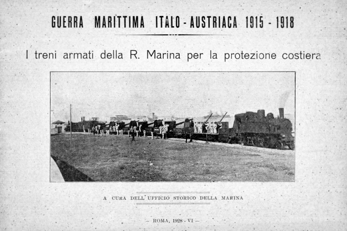 Treno armato della Regia Marina